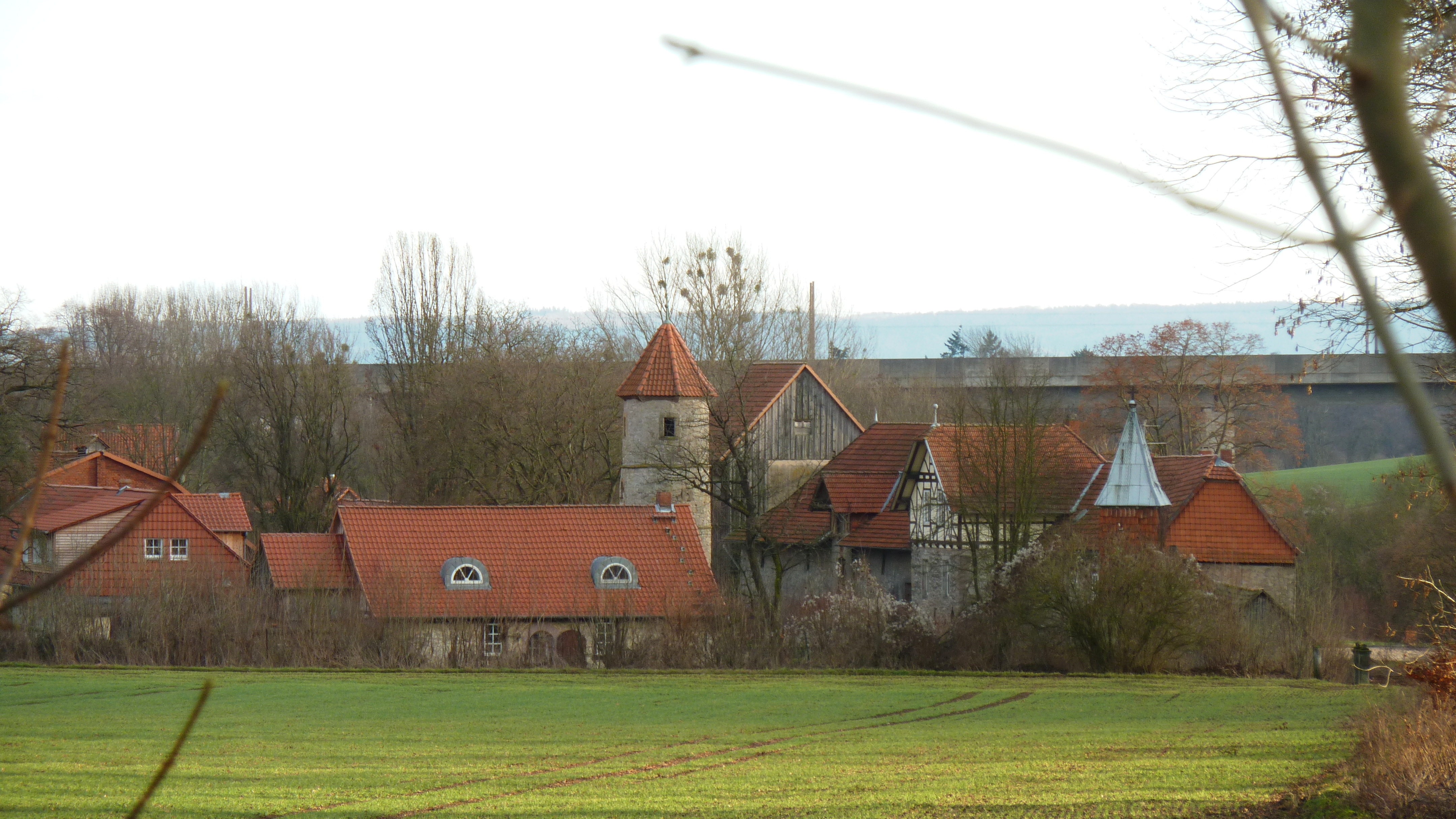 Blick von Westen zum Rittergut Olenhusen bei Settmarshausen, Gemeinde Rosdorf, Südniedersachsen